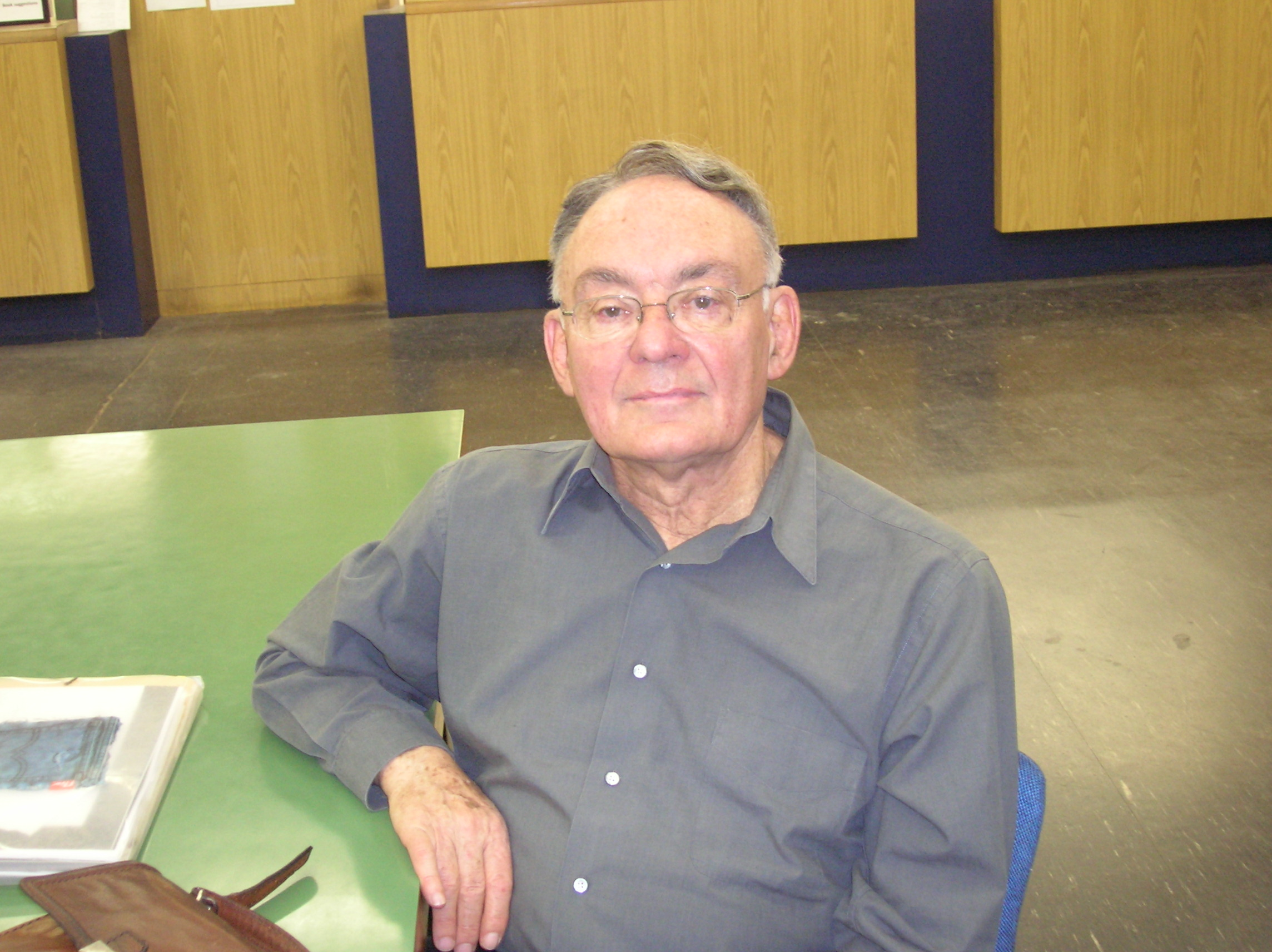 פרופסור דוד יעקבי